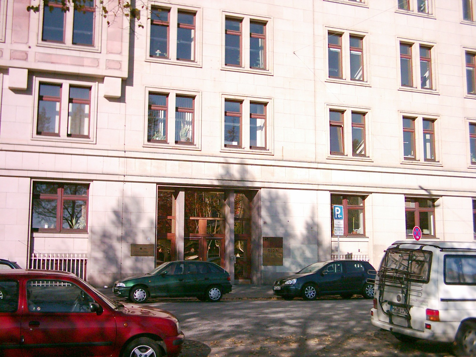 Hamburg, Neuer Jungfernstieg 21. Sitz der Deutschen Zentralbibliothek für Wirtschaftswissenschaften (ZBW), des GIGA German Institute of Global and Area Studies, sowie des Afrika-Vereins. Siehe auch / See also Image:Hamburg Deutsche Zentralbibliothek für Wirtschaftswissenschaften 01.jpg Image:Hamburg, Neuer Jungfernstieg 21 03.jpg Image:Hamburg, Neuer Jungfernstieg 21 04.jpg